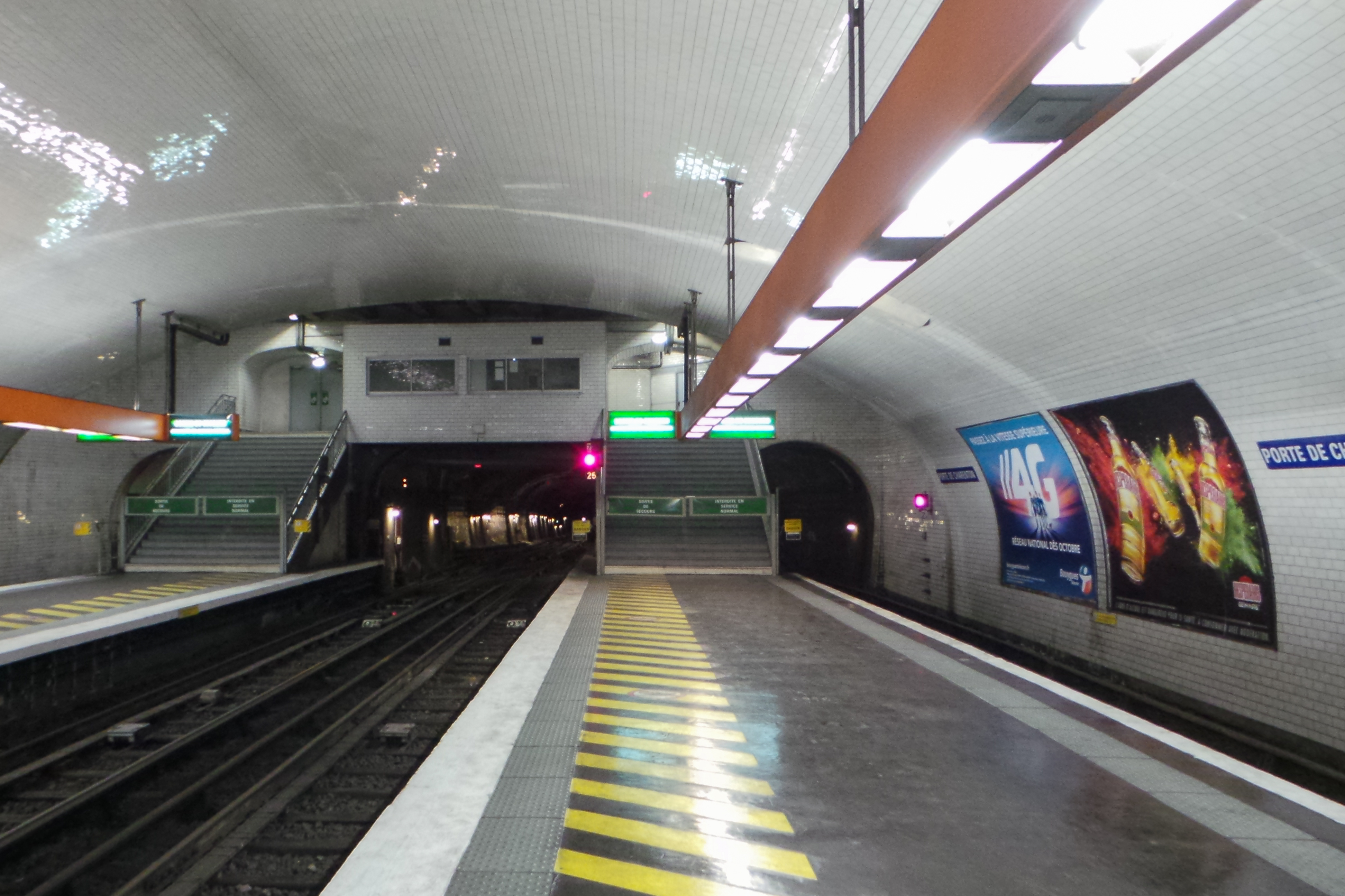 Station de métro Porte de Charenton, ligne 8 du métro de Paris - Paris, France